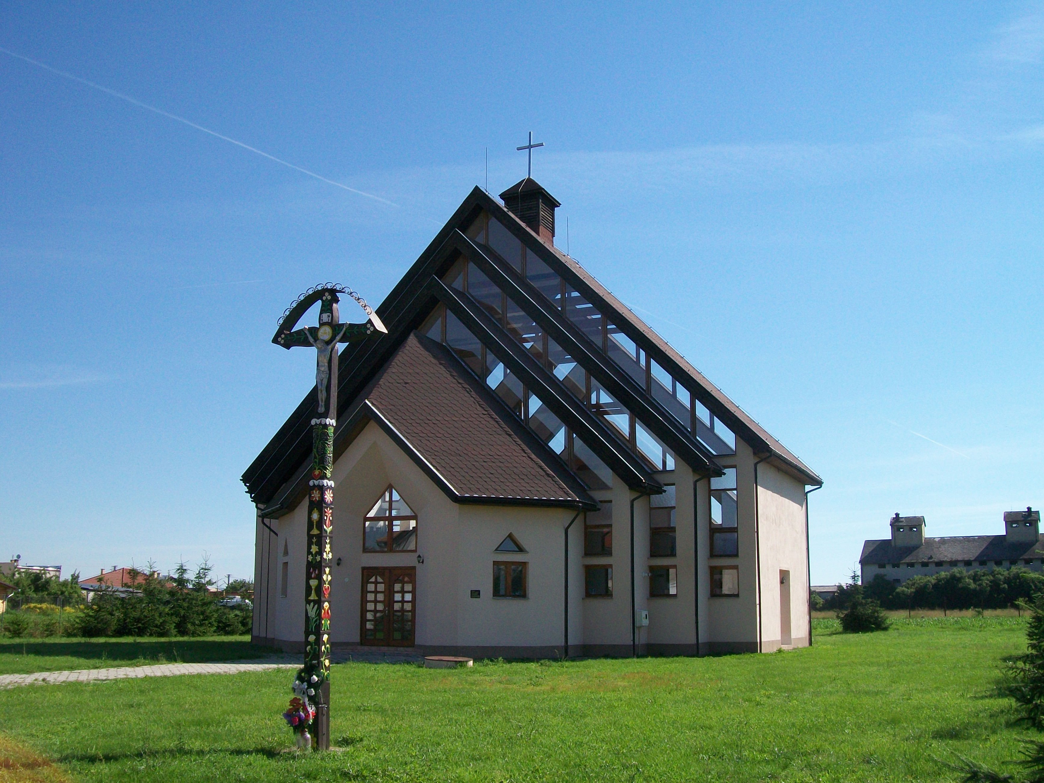 Rímsko-katolícky kostol v Boľkovciach (časť Osada) zasvätený Fatimskej Panne Márii.